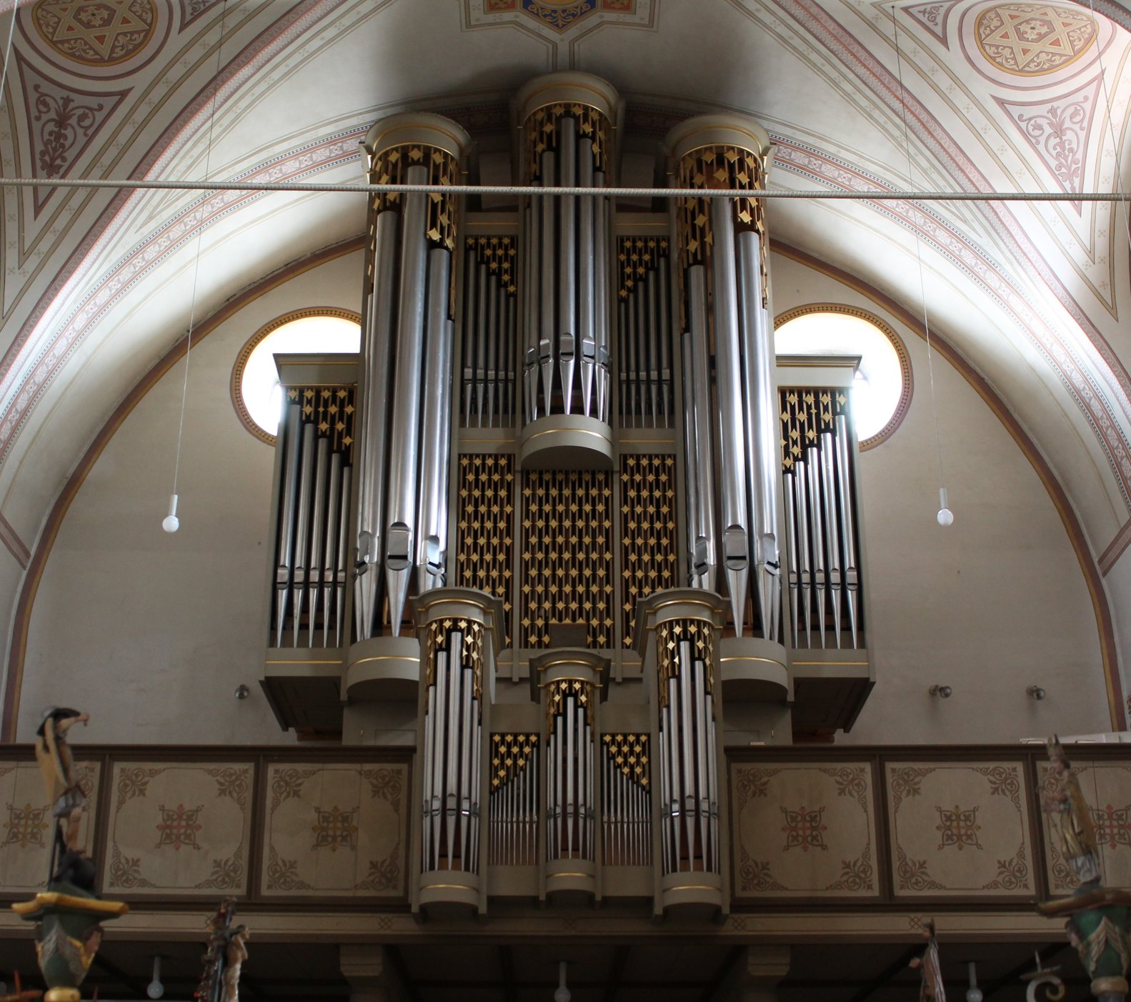 Orgel der Pfarrkirche Ilmmünster (1985, A. Staller, III/36)